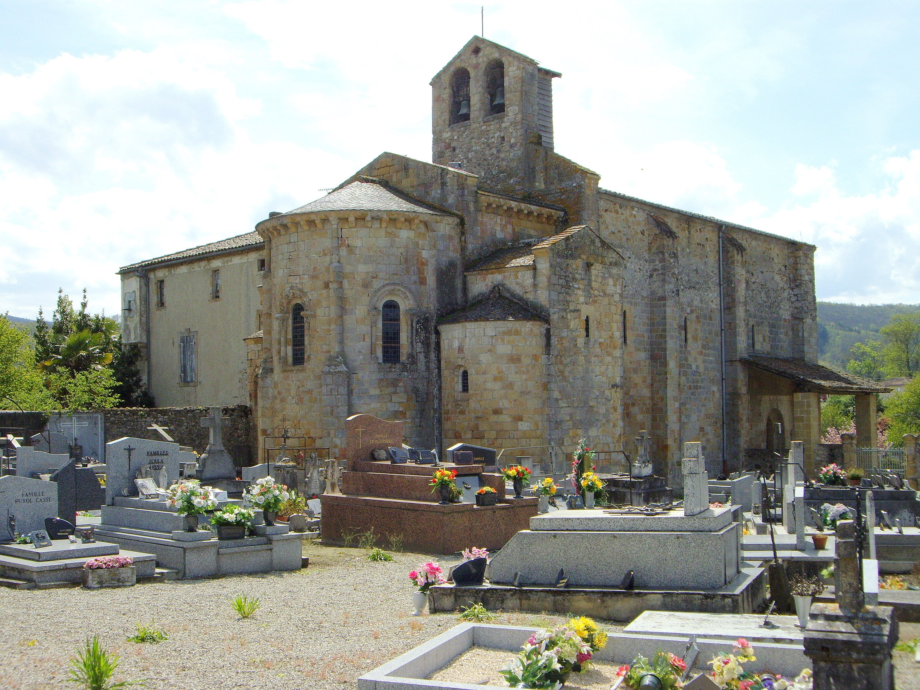 Église de Saint-Jean-de-Verges (Ariège, France).